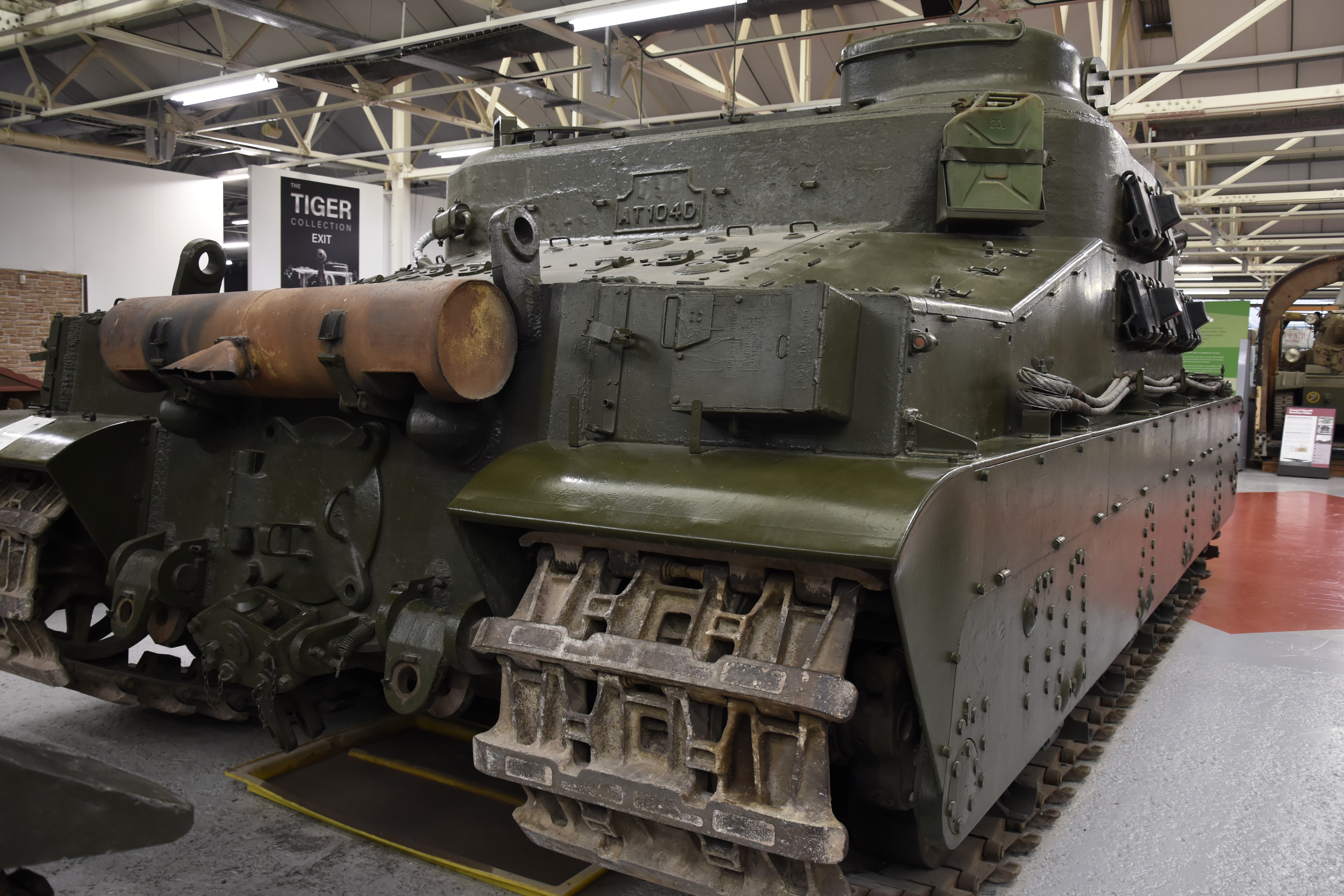 Tortoise Tank Museum Bovington - achterzijde - 19-5-2017 10-50-29